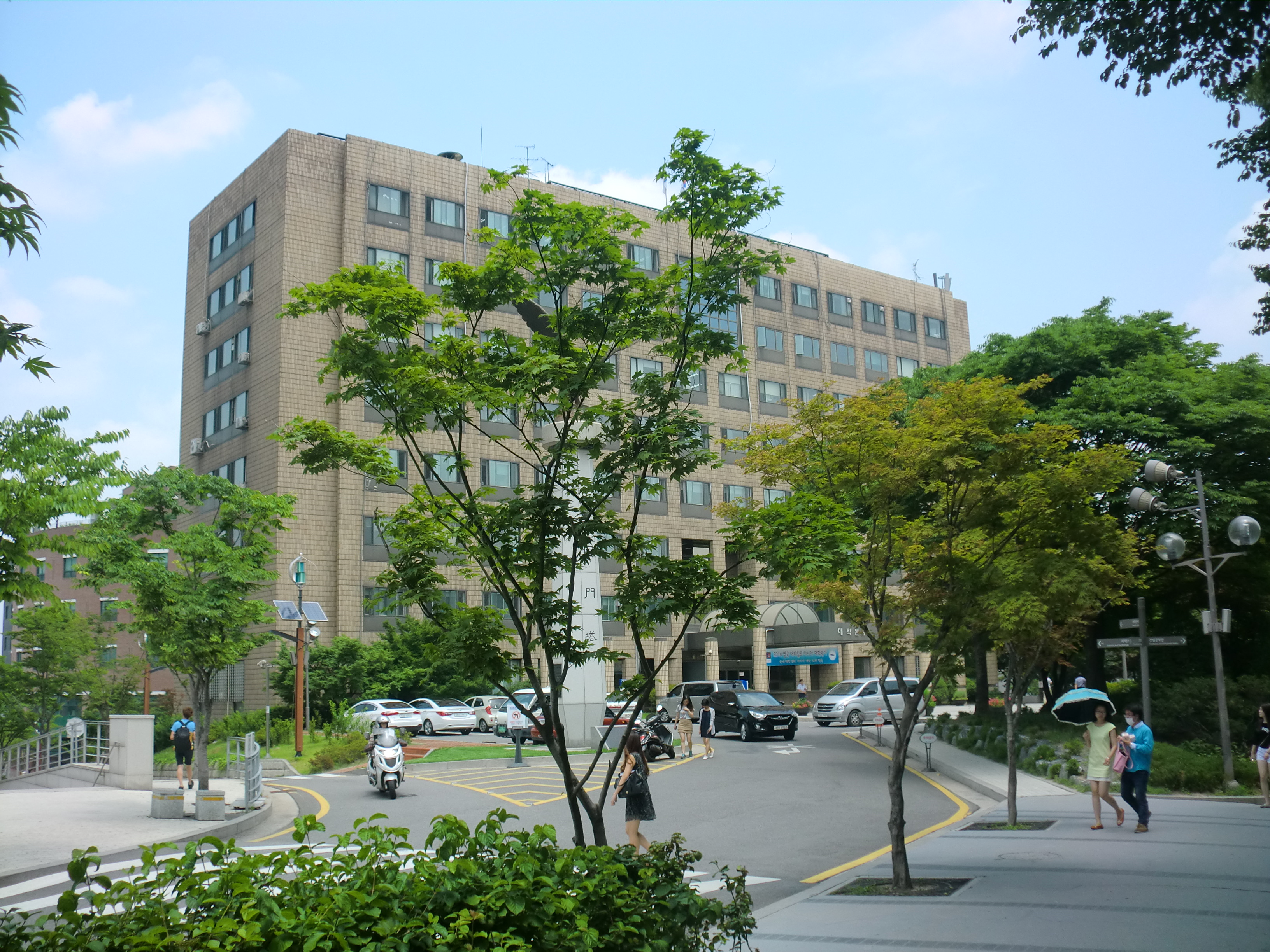 서울특별시 동대문구에 있는 서울시립대학교